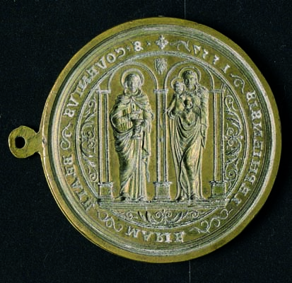 Sceau de l'abbaye de Leffe (Dinant)